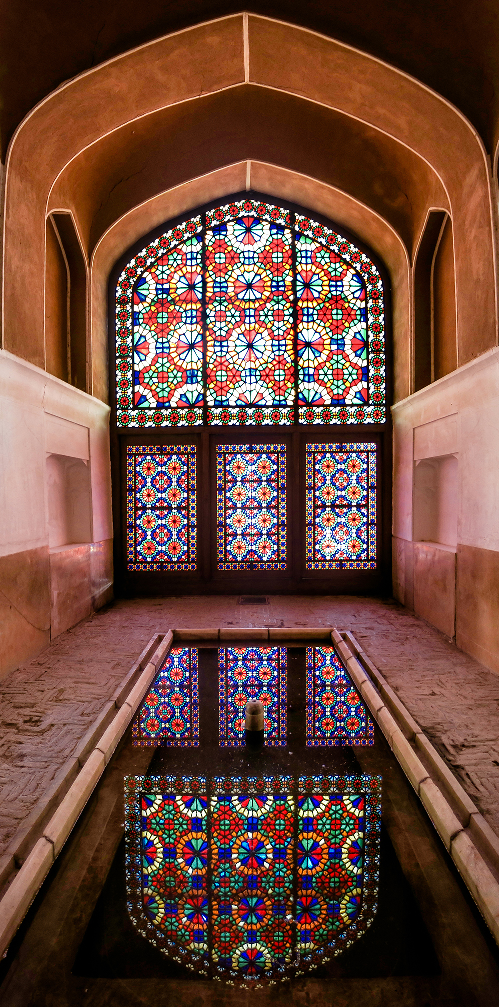 پنجره مشبک با شیشه‌های رنگی، نمونه معماری داخلی ایرانی در باغ دولت‌آباد یزدباغ دولت آباد از باغهای قدیمی شهر یزد در کشور ایران و هم ردیف باغ فین در کاشان و باغ شاهزاده ماهان در کرمان میباشد. بادگیر عمارت بادگیر آن با ارتفاع ۳۳/۸ متر بلندترین بادگیر خشتی شناخته شده در جهان است. این باغ در تاریخ ۱۳۴۶/۱۲/۲۳ به شماره ۷۷۴ در ردیف آثار ملی ایران قرار گرفته است. و همچنین یکی از باغهای ایرانی ثبت شده در میراث جهانی توسط یونسکو است.